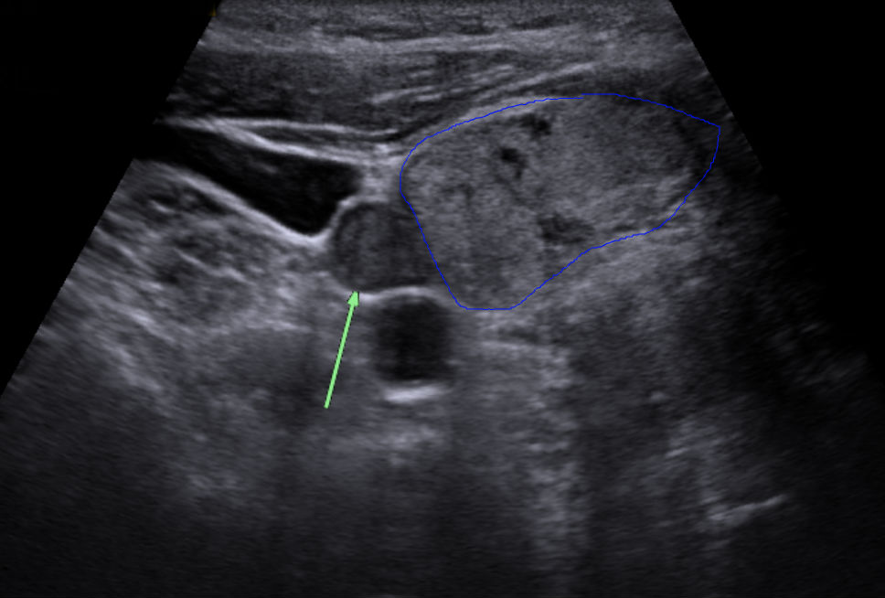 Nebenschilddrüsenadenom in der Sonographie: Glatt begrenzte, eher echoarme, rundliche bis ovaläre Formation (Pfeil) neben/ausserhalb dem (hier rechten) Schilddrüsenlappen (blau umrandet). Lateral daneben die V. jugularis, hinter dem Adenom die A. carotis.